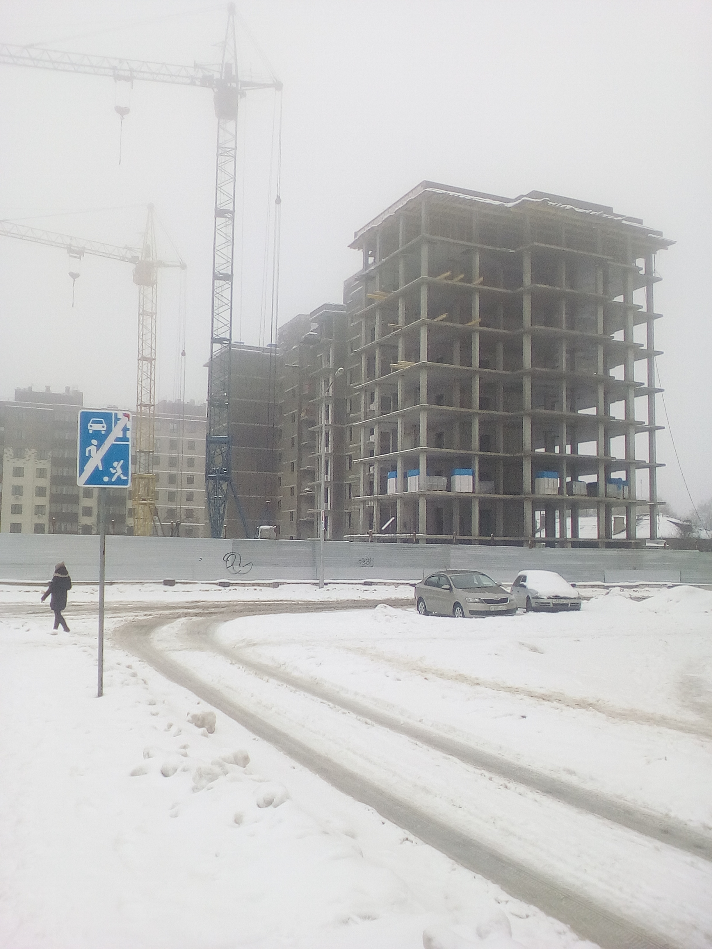 Дом на улице Зелёная в Дубовом